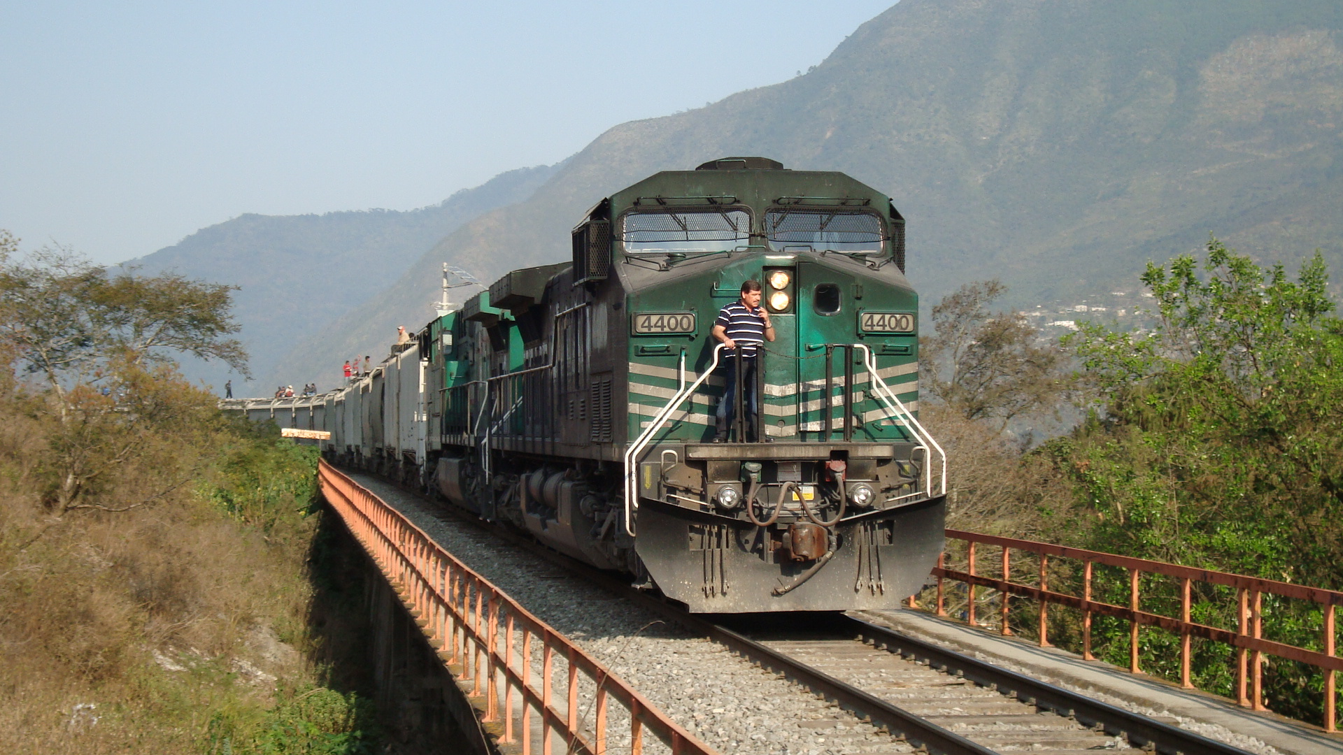 Ferrosur 4400 Norte entre Encinar SC y Tecamalucan, Veracruz. 2009.